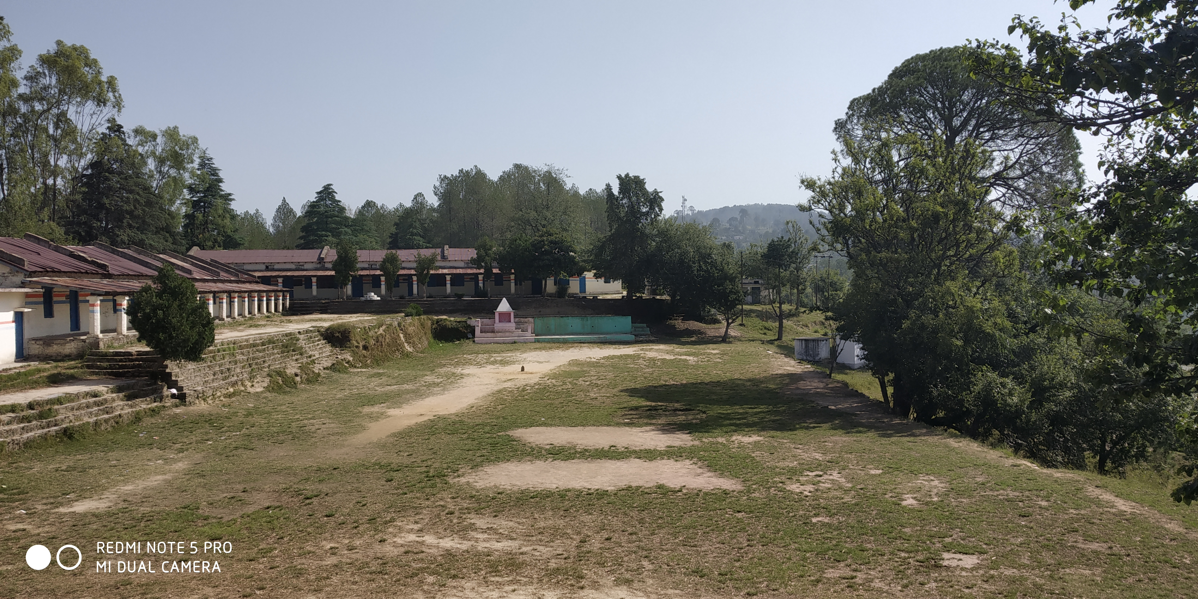 Aadarsh Inter Collage Jaurasi